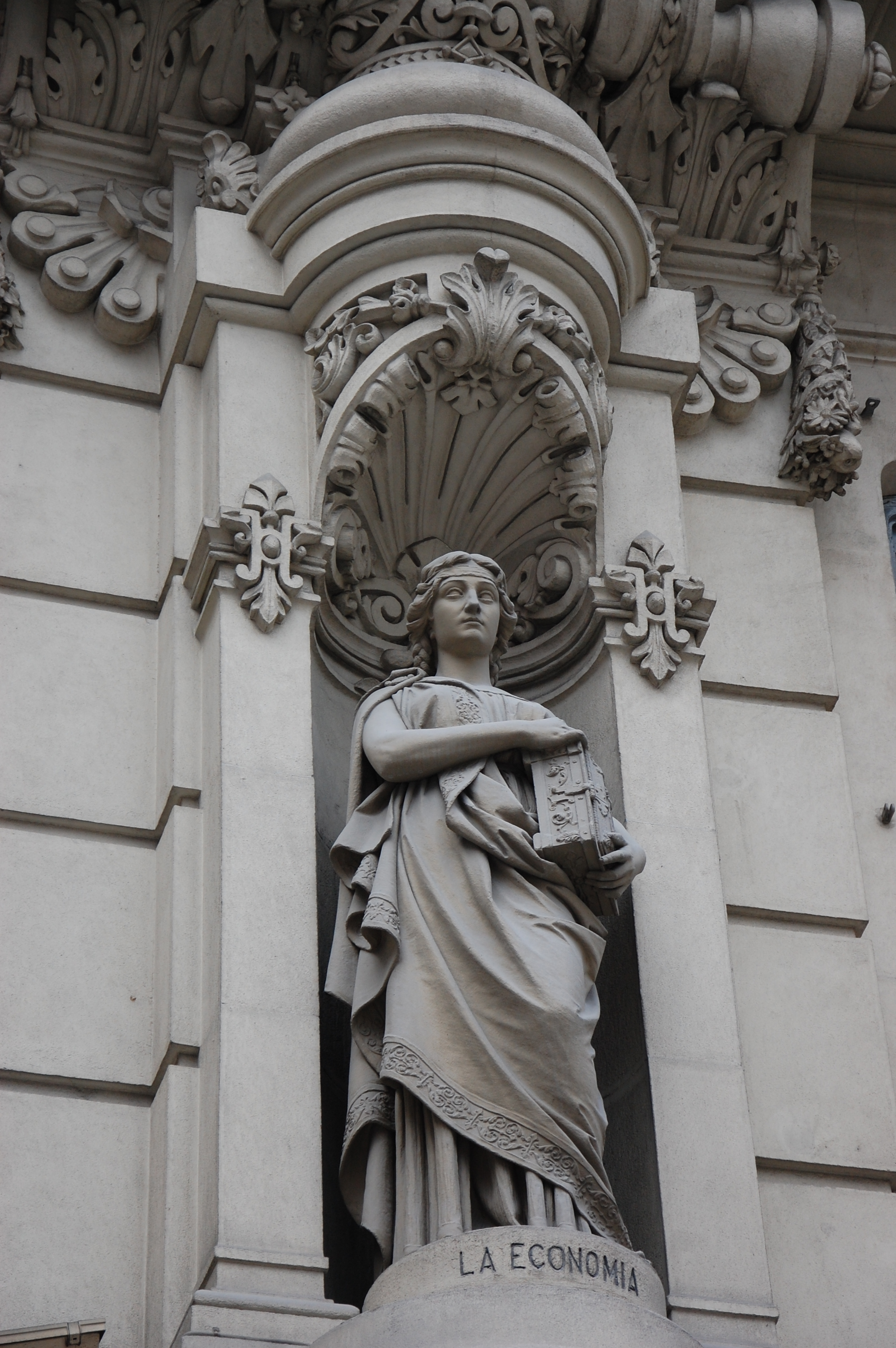 Estatua representando a "la economía" en la fachada del edificio del Banco Central Hispano en Madrid.